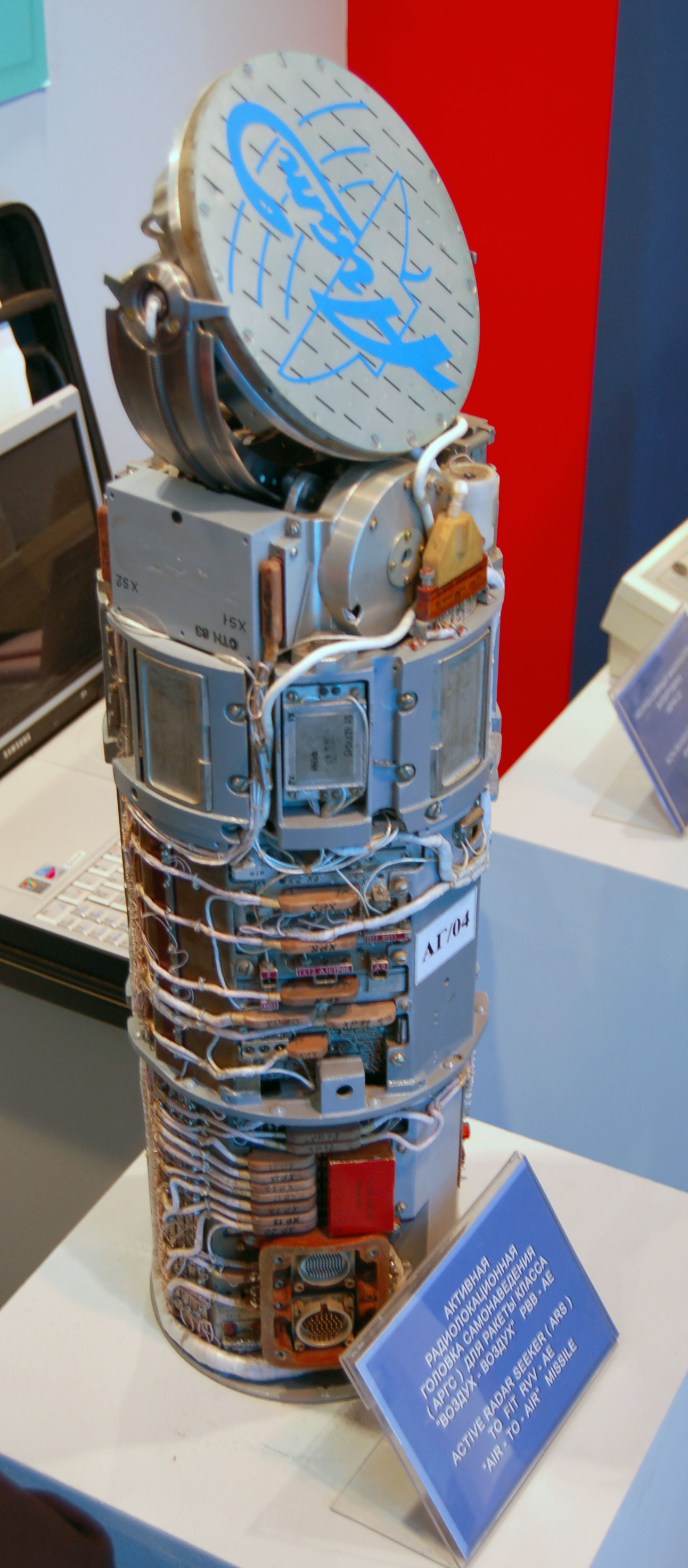 ГСН ракеты РВВ-АЕ производства Агат. МАКС-2009